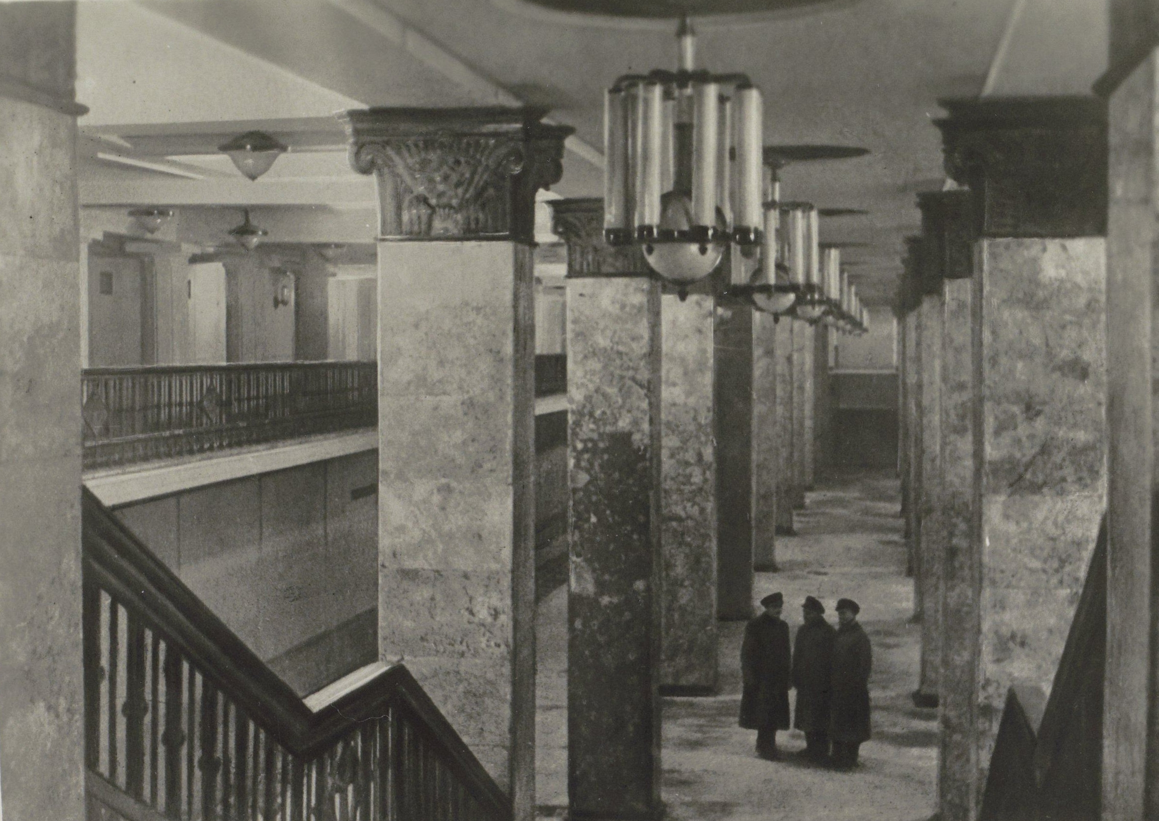 IdentificatieTitel(s): Interieur van metrostation KomsomolpleinPerron van het station Komsomolplein (titel op object)Objecttype: foto Objectnummer: RP-F-F00935-FOmschrijving: Onderdeel van Fotoalbum met opnames van de Moskouse metro.VervaardigingVervaardiger: fotograaf: Mospo SostawitolPlaats vervaardiging: MoskouDatering: 1930 - 1935Fysieke kenmerken: ontwikkelgelatinezilverdrukMateriaal: fotopapier Techniek: ontwikkelgelatinezilverdrukAfmetingen: foto: h 83 mm × b 118 mmOnderwerpWat: underground railway, 'métro'underground stationplatform (railway, tramway)Waar: MoskouVerwerving en rechtenVerwerving: overdracht van beheer 1994Copyright: Publiek domein